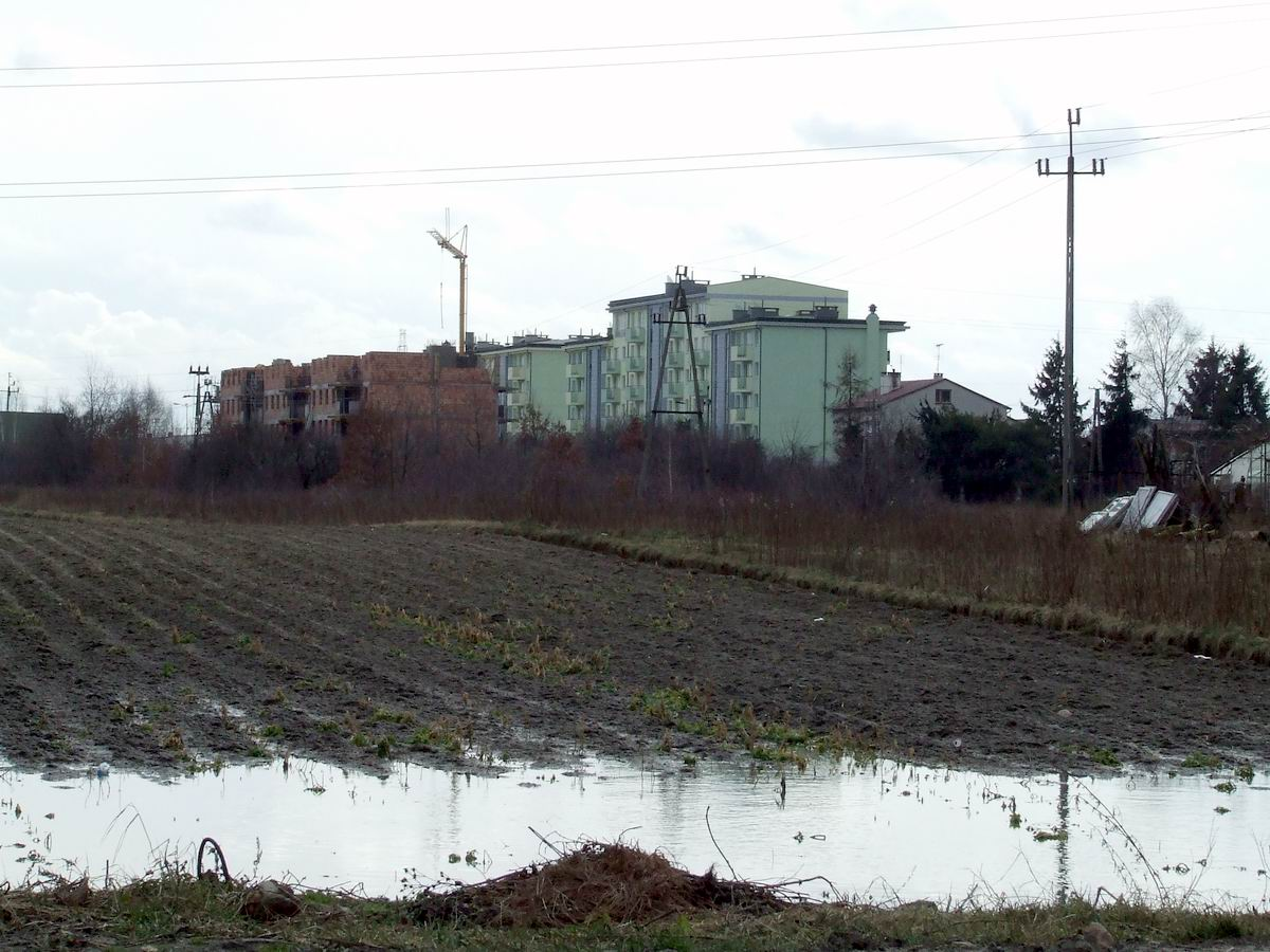 Nowa zabudowa Nowej Iwicznej